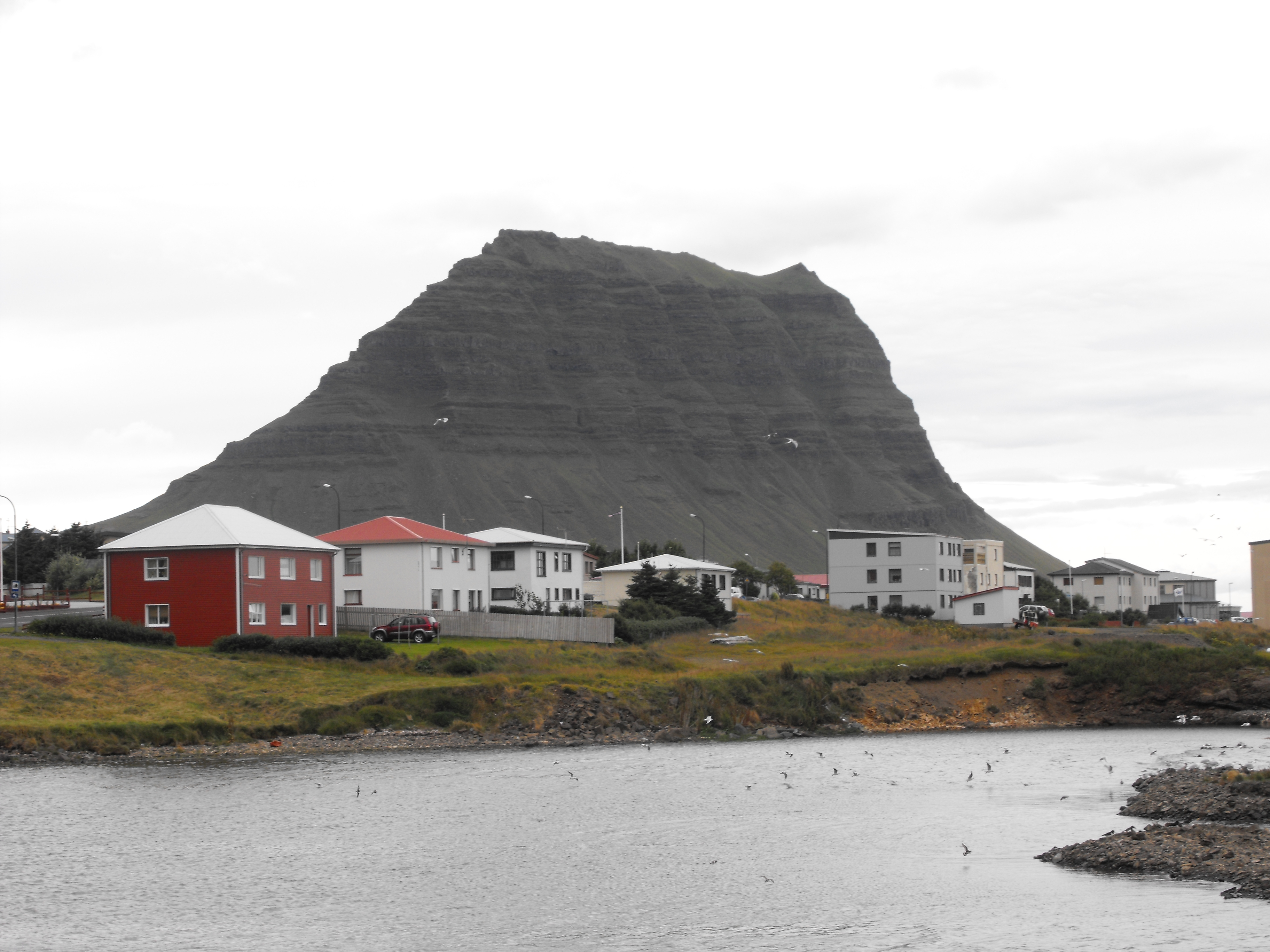 Grundasfjordur - Iceland